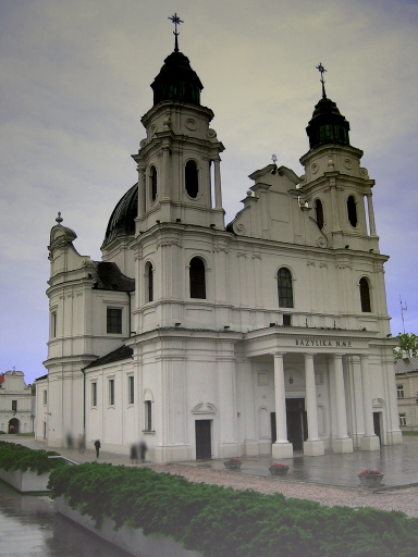 Bazylika Narodzenia Najświętszej Maryi Panny w Chełmie.